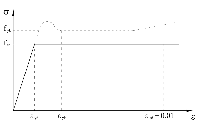 Grafico modello legame costitutivo acciaio